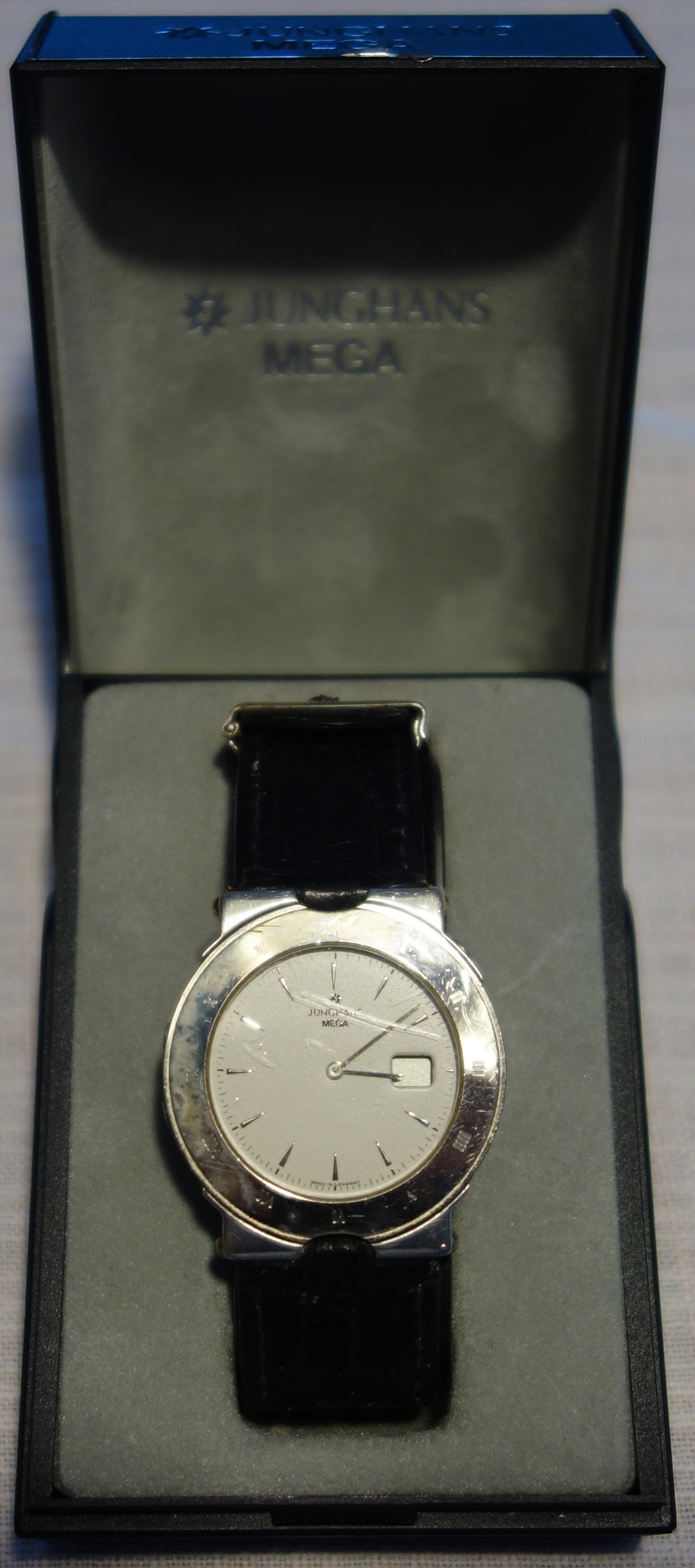 Variante der Analoguhr Junghans Mega mit kleiner Datumsanzeige rechts